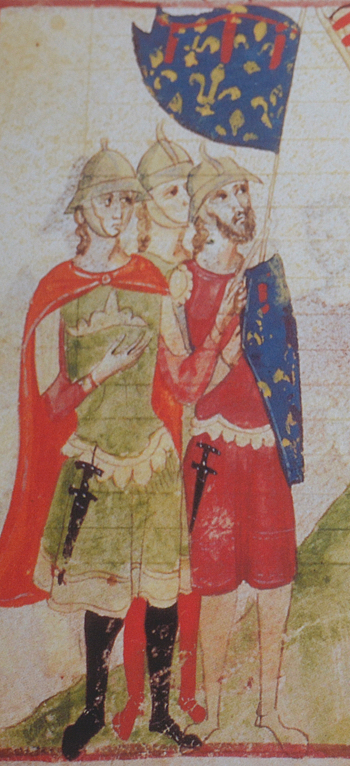 Filippo, principe di Taranto, figlio di Carlo II